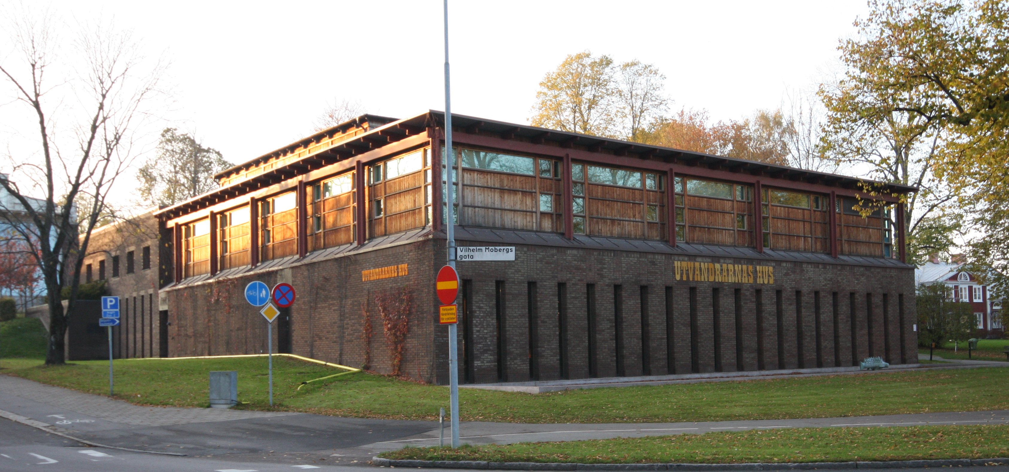 Utvandrarnas Hus (House of Emigrants) in Växjö, Kronobergs län, Småland, Sweden; architect Bent J Jörgensen (1968)